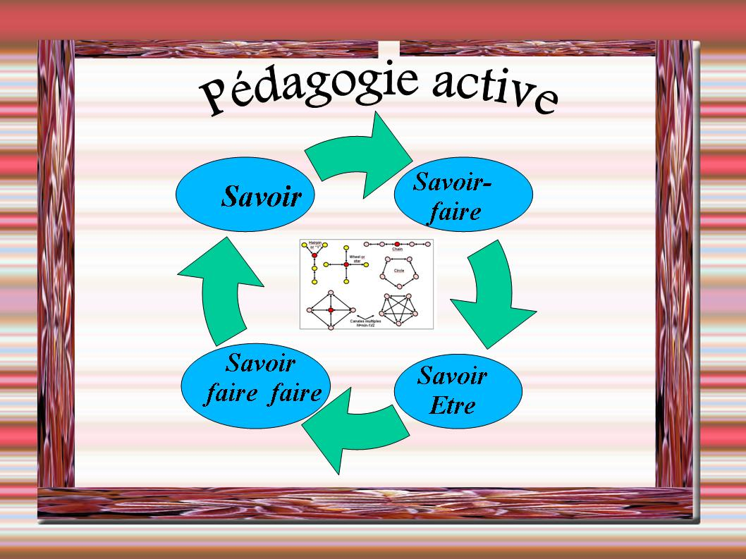 Pédagogie et apprentissage : du savoir au savoir-être